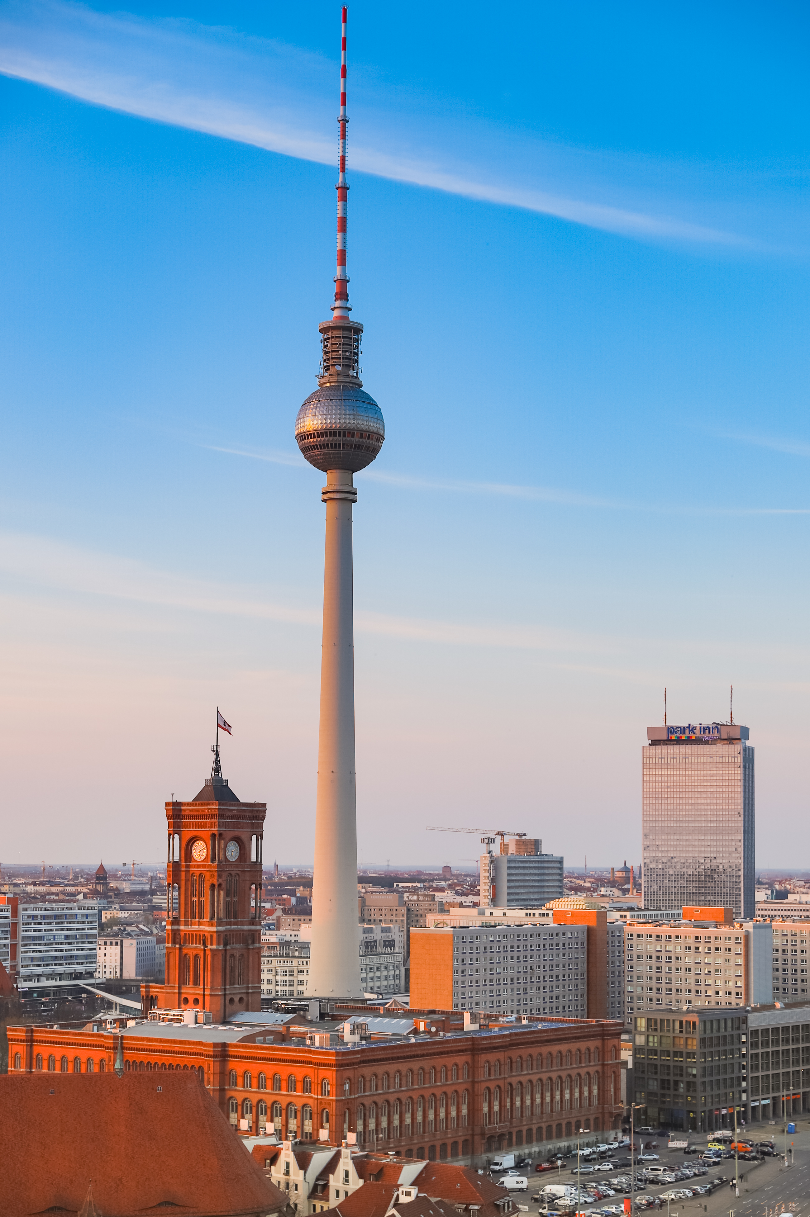 Fernsehturm Television tower Berlin